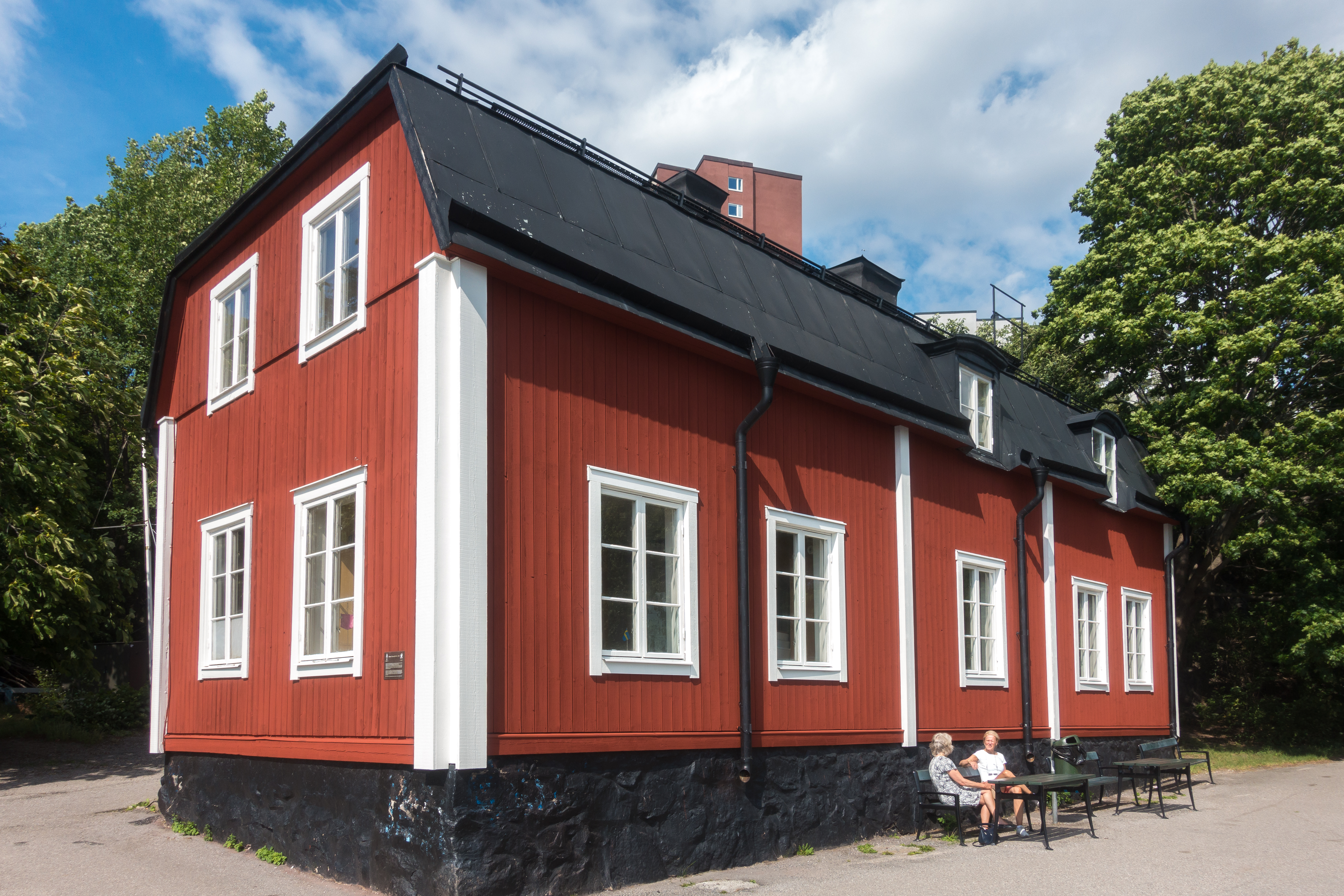 Mårten Triewalds malmgård på Kungsholmen i Stockholm i juli 2020.